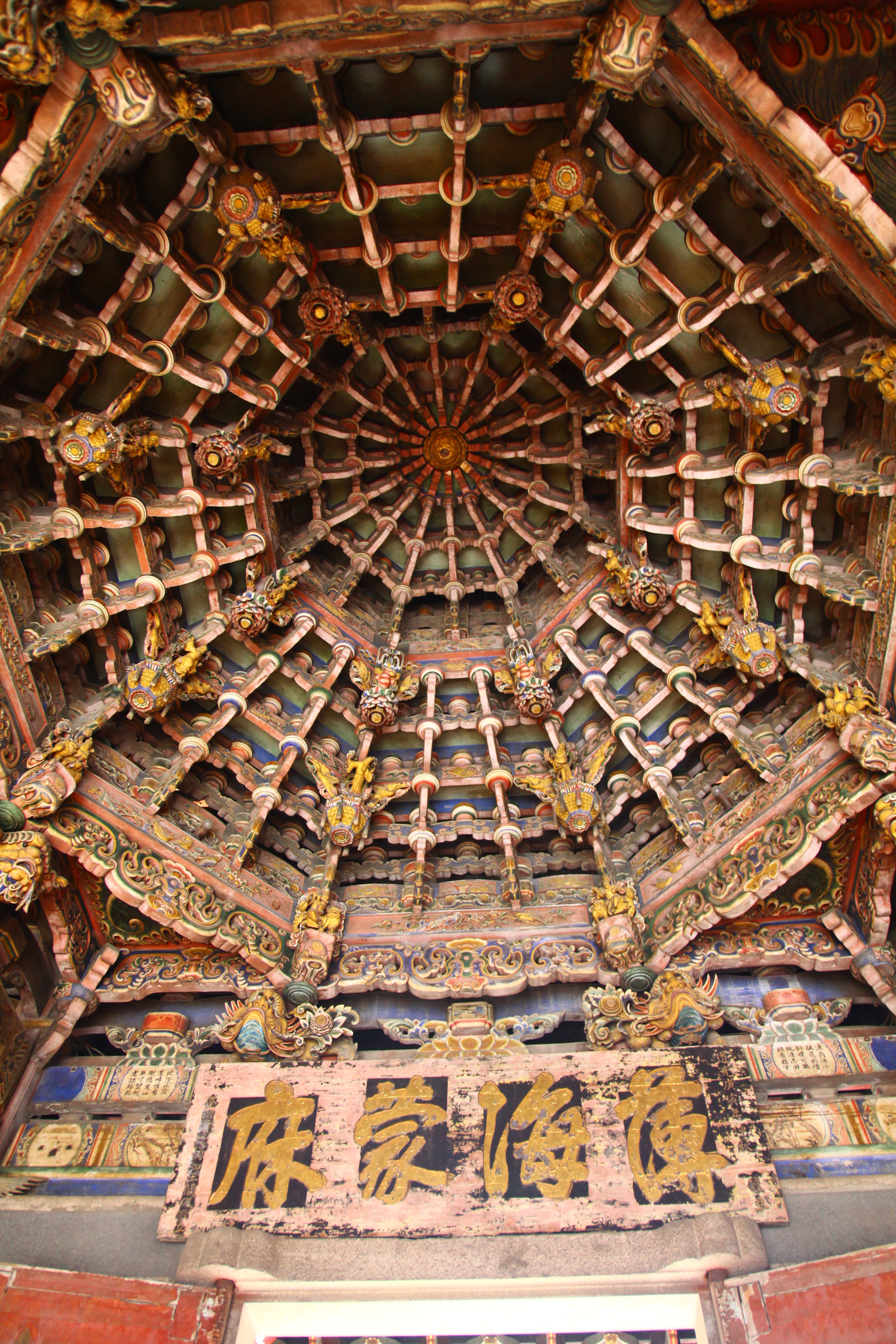 鹿港大天后宮藻井